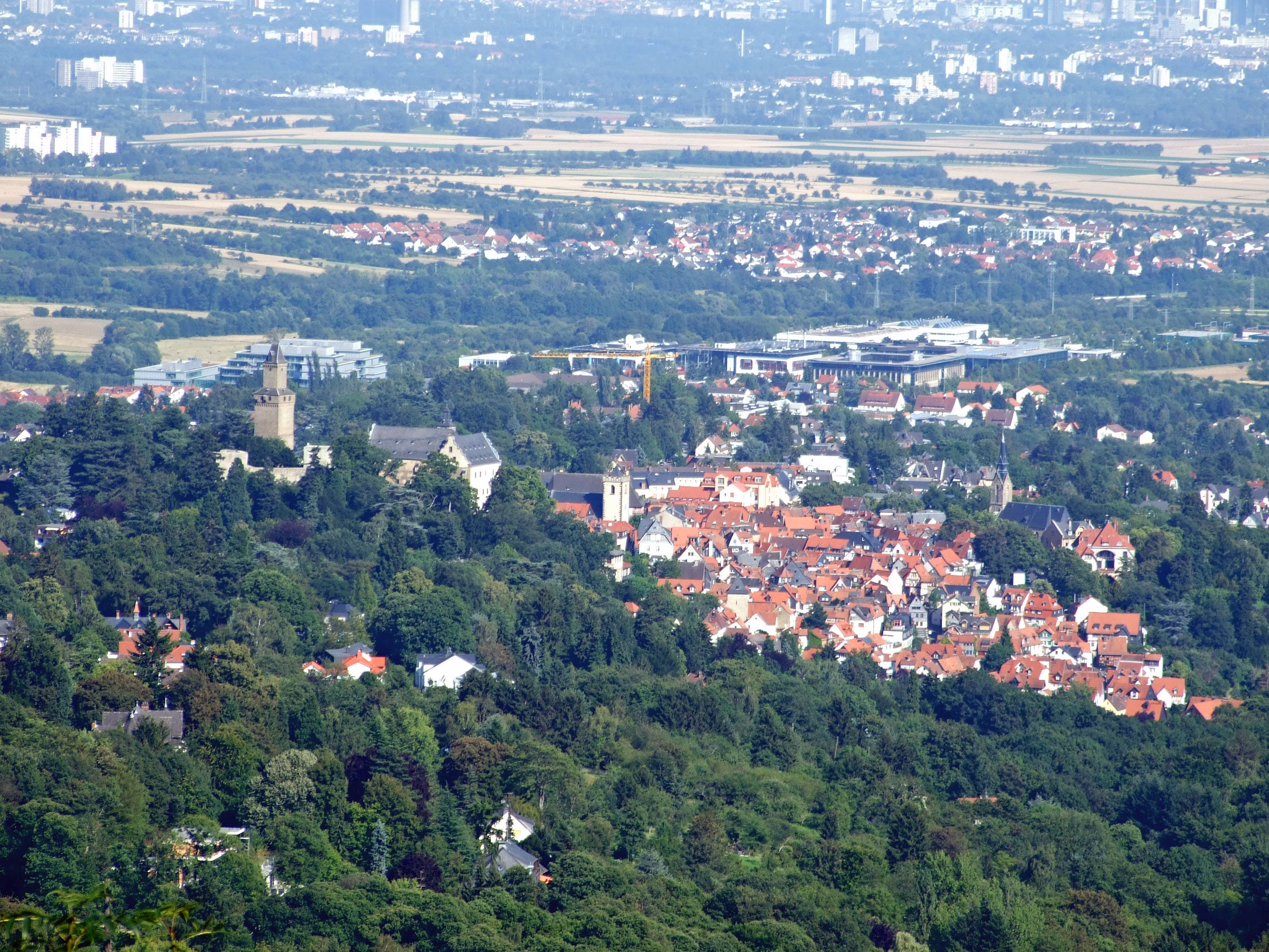 Kronberg im Taunus von Falkenstein aus (hinter dem Braun-Werksgelände und der S-Bahngleise ist Niederhöchstadt zu sehen)